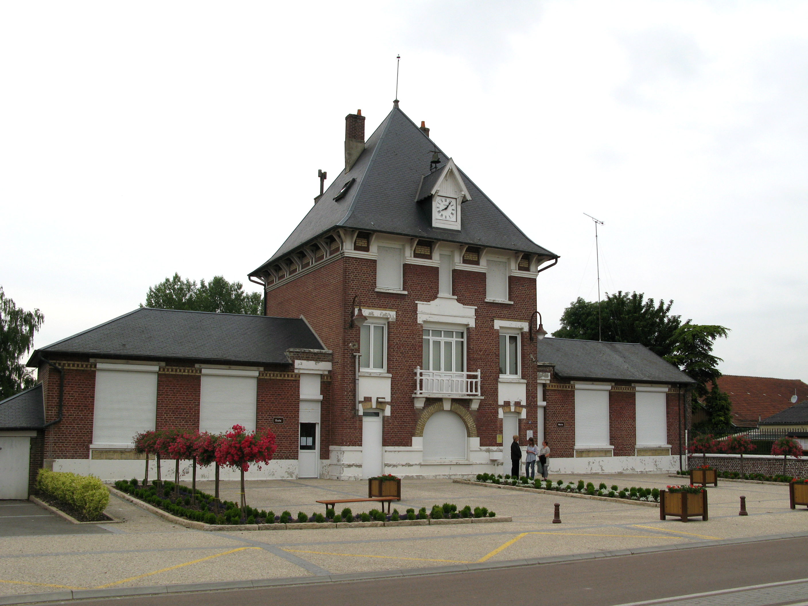 Brissay-Choigny (Aisne, France) - La Mairie. . .